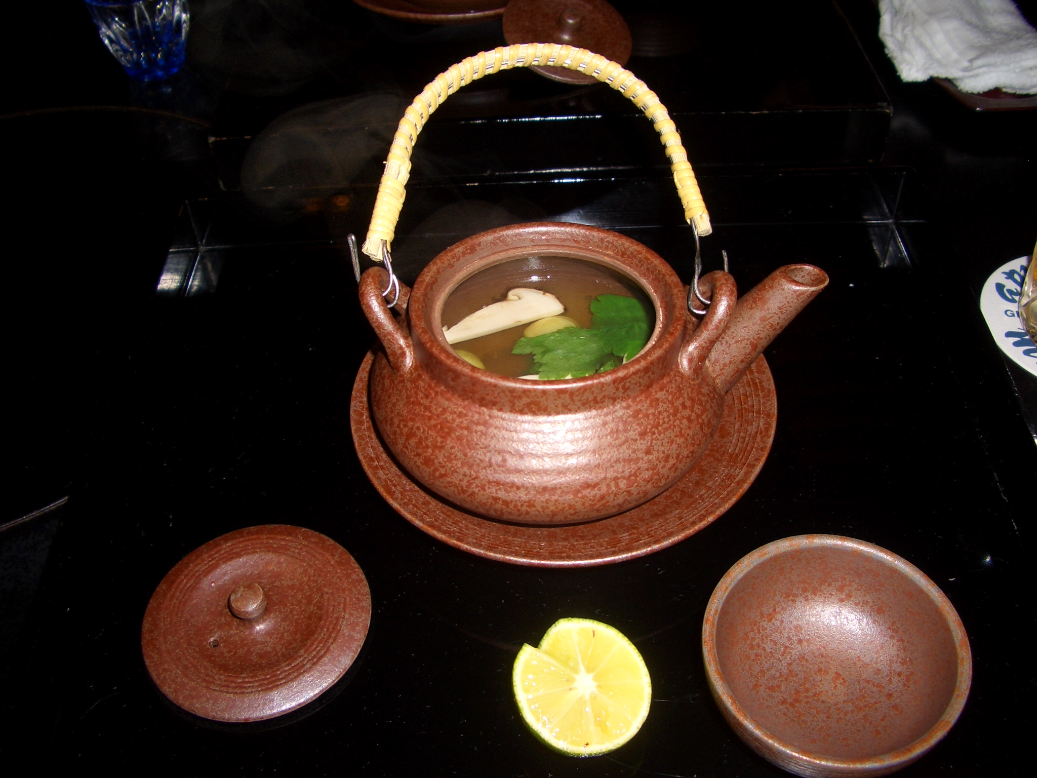 Dobin mushi tipica zuppa giapponese servita nella apposita teiera - ristorante Yoshino di Ginza (Tokyo)